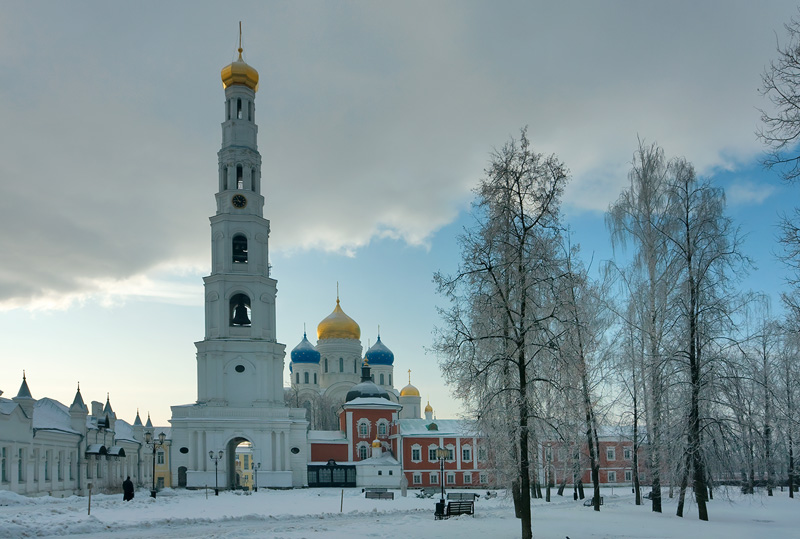 Колокольня (Москва и Московская область, Дзержинский, площадь Святителя Николая, 1)